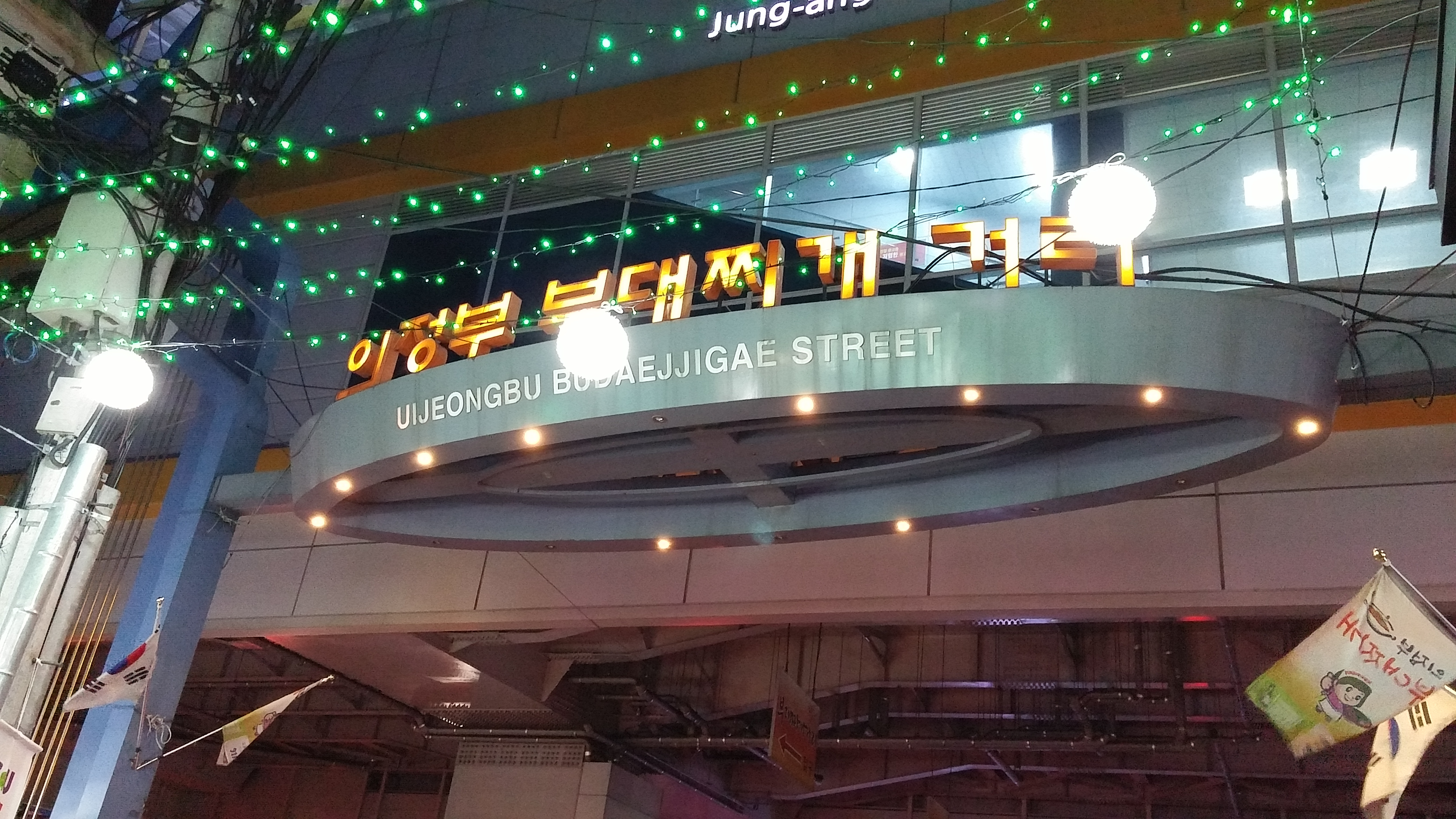 Die Budaejjigae-Straße in Uijeongbu, South Korea.